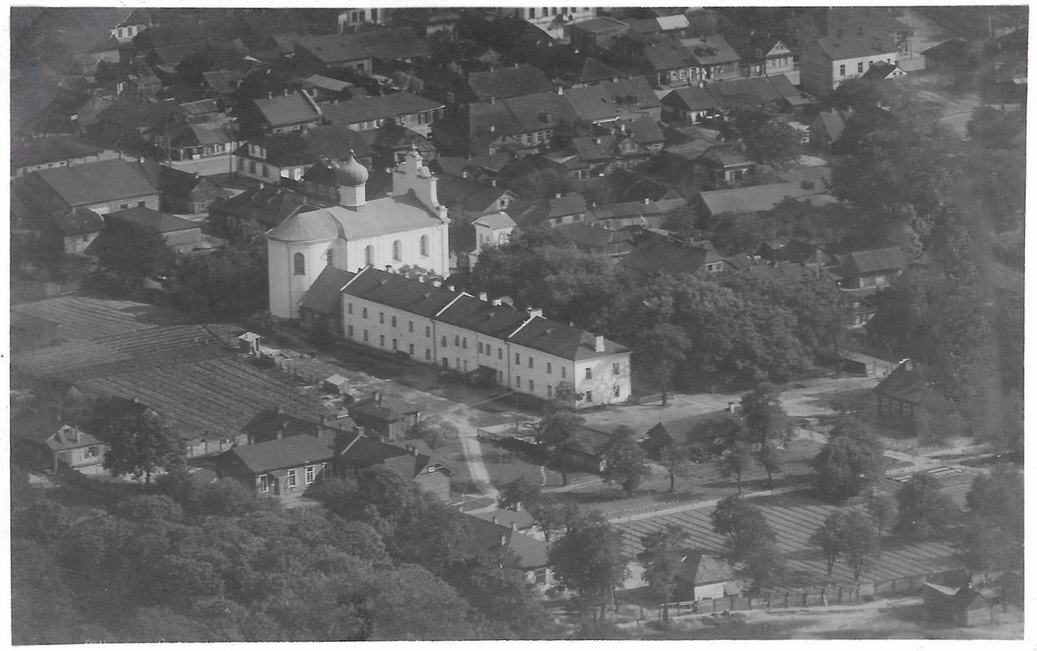 Беларуская (тарашкевіца): Пінск (Pinsk), вуліца Бэрнардынская (vulica Bernardynskaja) у бок Альбрэхтаўскай (vulica Albrechtaŭskaja). Касьцёл Сьвятога Міхала Арханёла і кляштар бэрнардынаў. Аэрафотаздымак